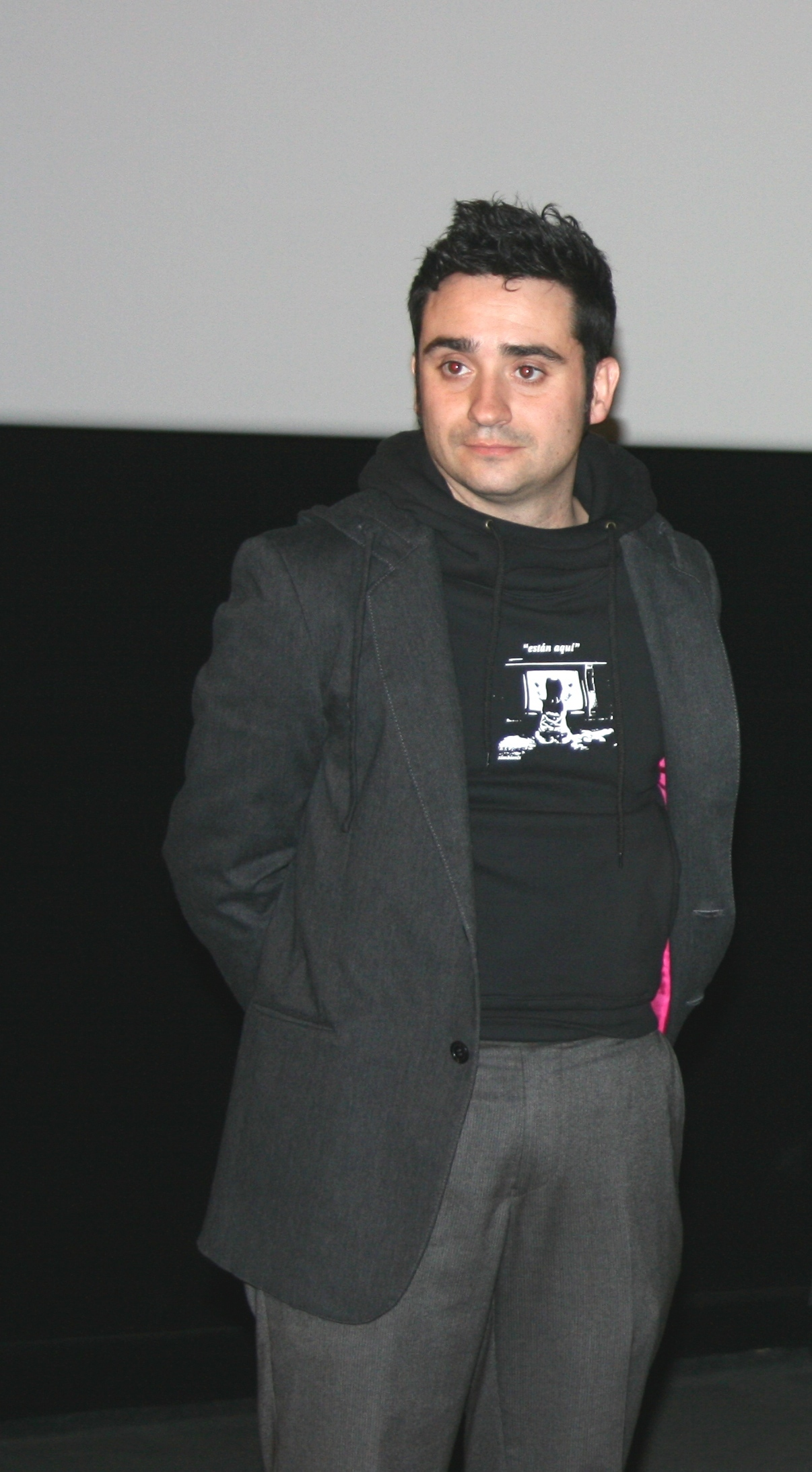 Juan Antonio Bayona à l'avant-première de L'Orphelinat diffusée à l'UGC Ciné Cité Les Halles, à Paris.